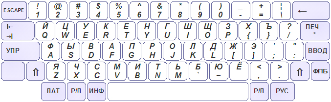 Раскладка клавиатуры ЕС-1845